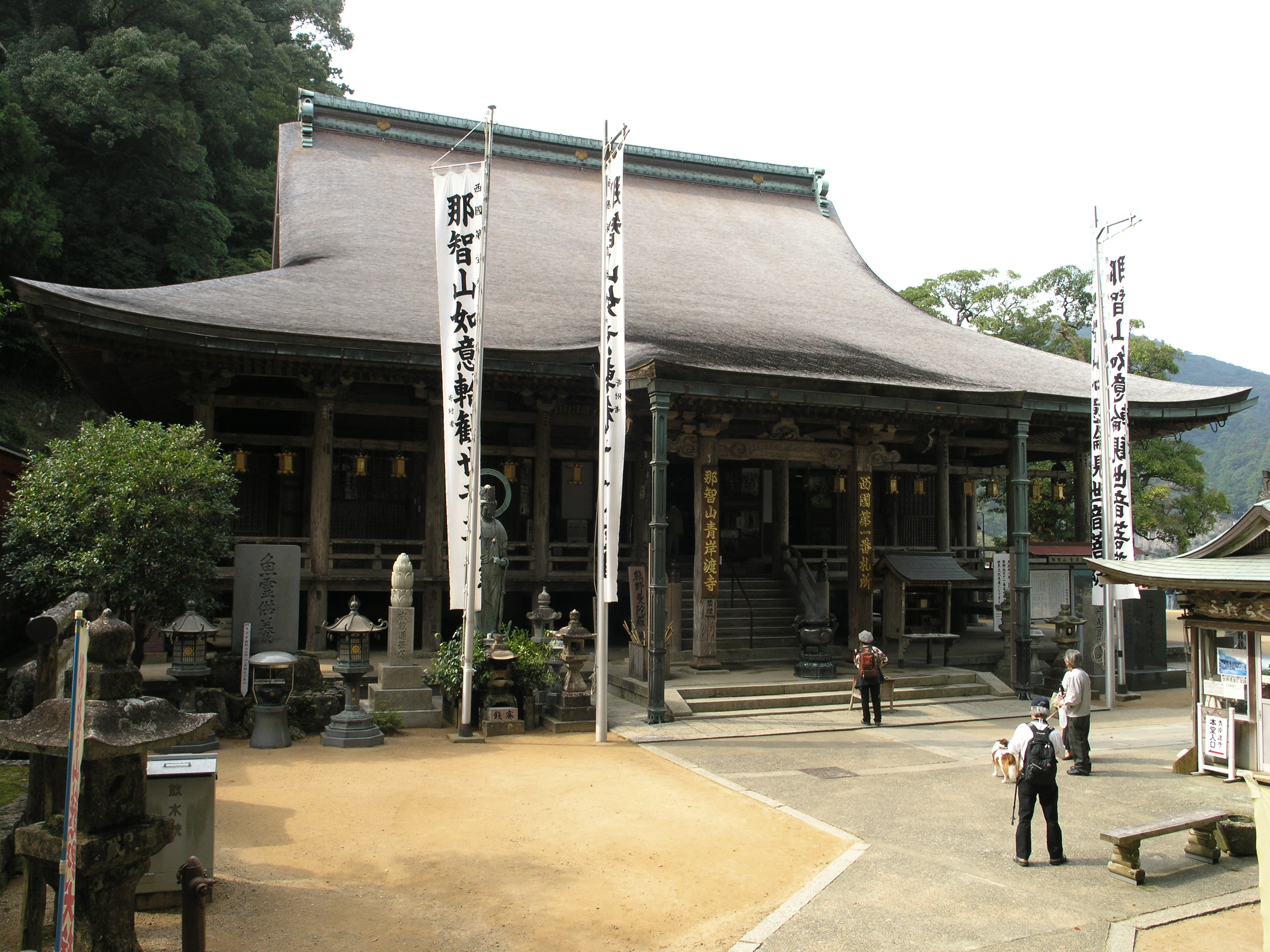 那智山青岸渡寺 (和歌山県東牟婁郡那智勝浦町) 2008年10月撮影。 機材：C8080WZ 撮影者：Kansai explorer